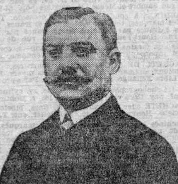 Duvigneau de Lanneau, Président de l'USFSA en décembre 1904.